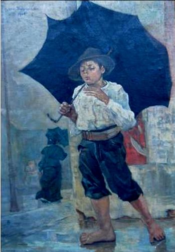 Copil cu umbrelă, Ulei pe pânză, 950 x 630 mm, Nr. inventar / Accession number 384, Ordin de clasare / Listing order 2016/11.01.2012/ Fond - Muzeul Judeţean Botoşani - BOTOŞANI